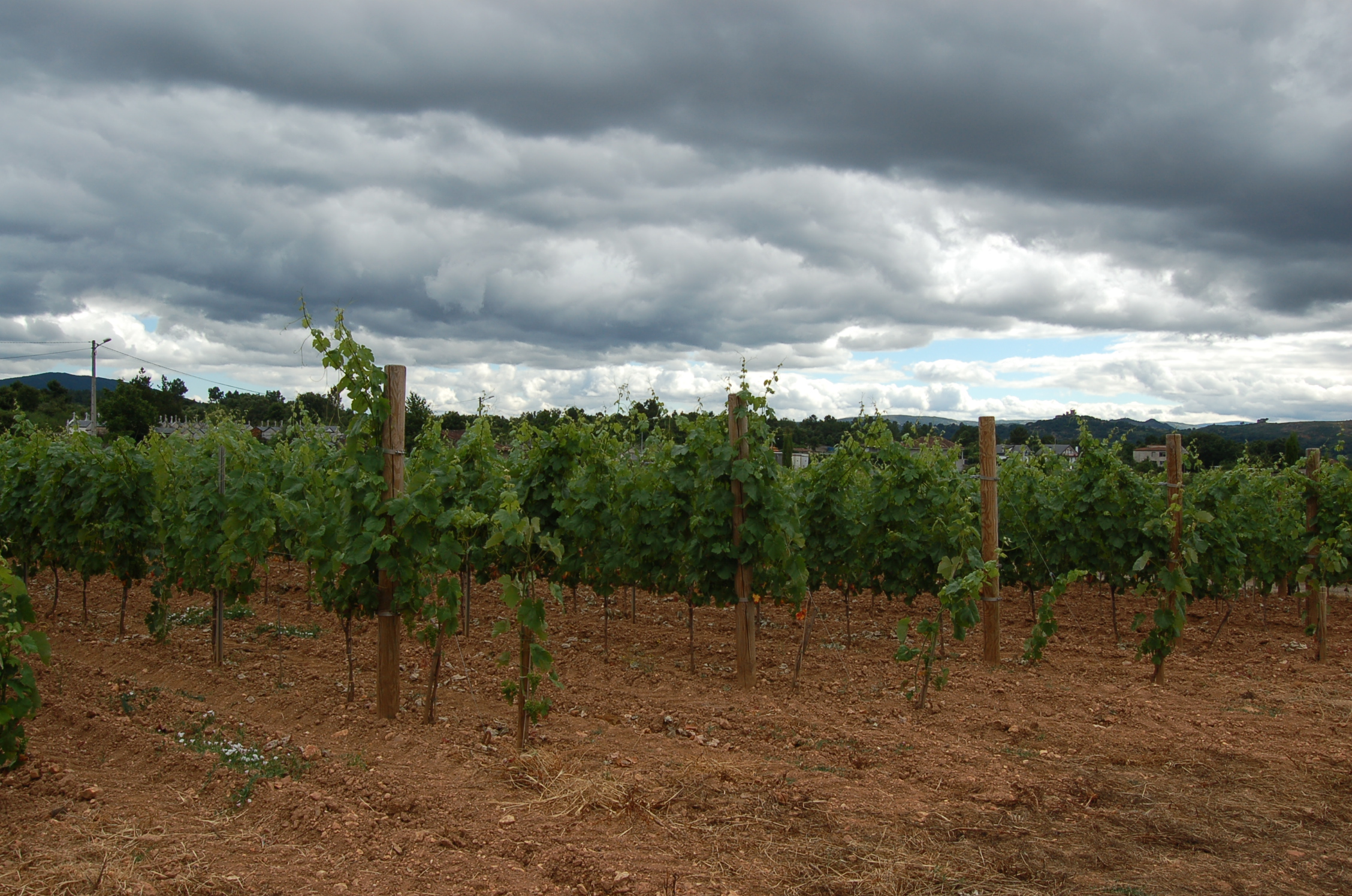 Vides da DO Monterrei en Vilamaior do Val, Verín